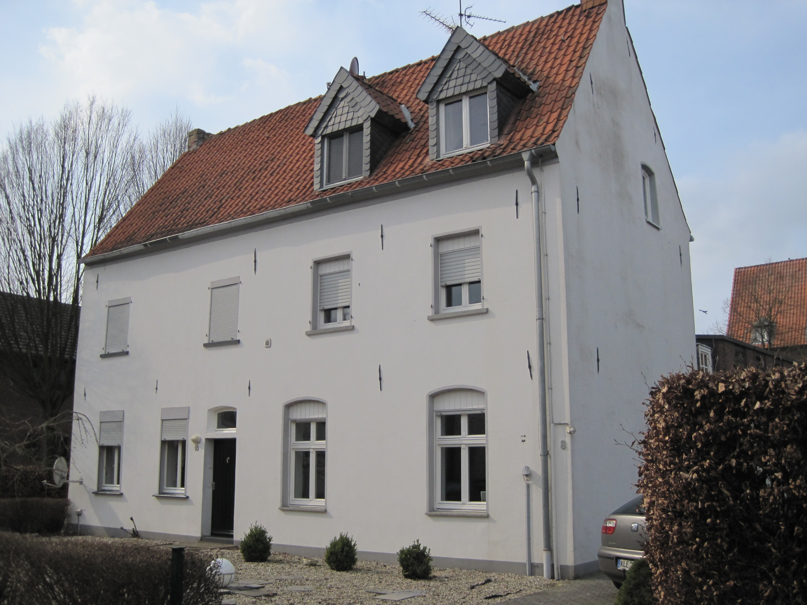 Kranenburg, Haus Neustraße 8-10 (ehemaliges Rektorenhaus des Klosters St. Katharina)